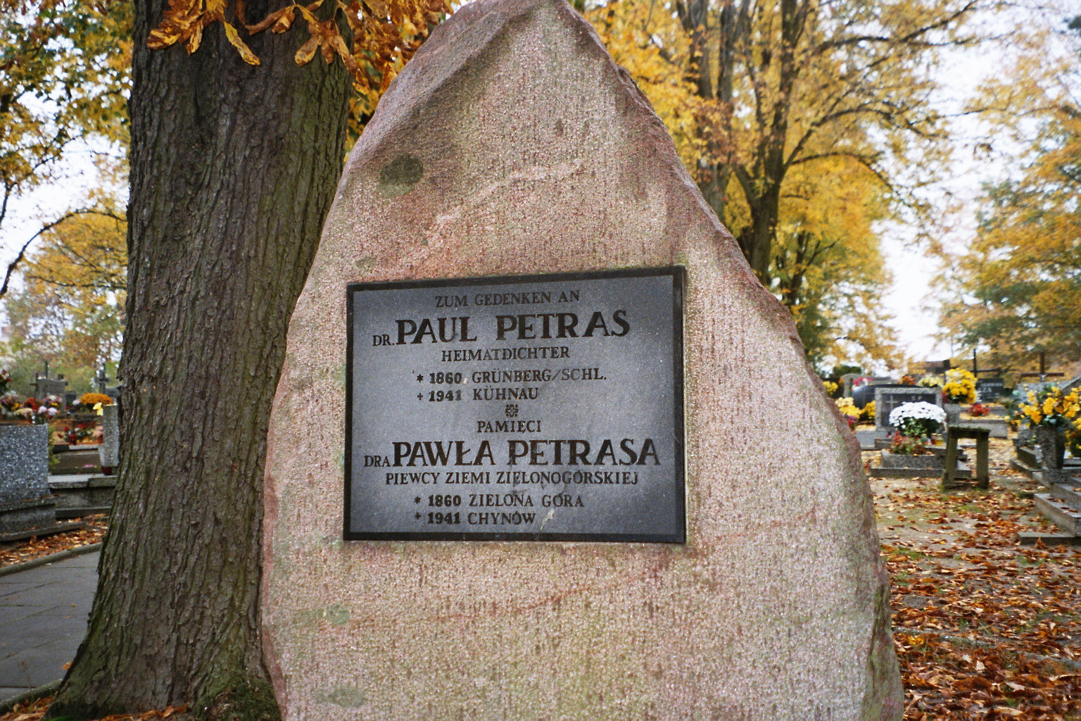 Dieses Ehrengrab steht auf dem Friedhof von Kühnau / Chynów bei Grünberg / Zielona Góra